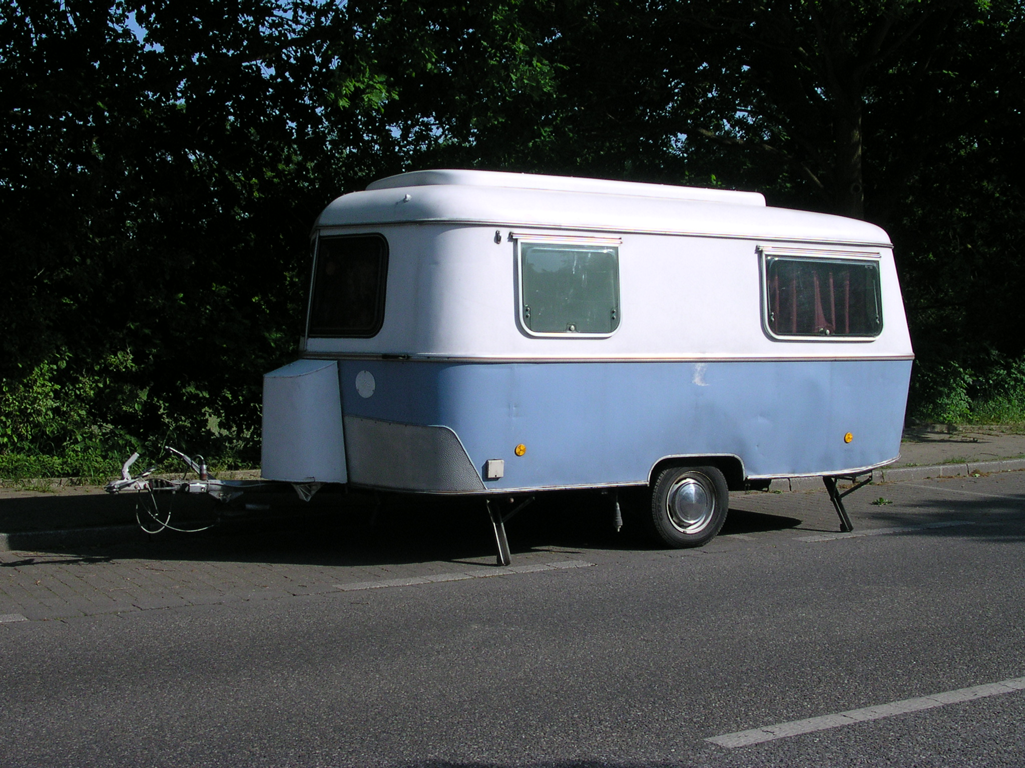 Eriba Wohnwagen “Triton”, gebaut Ende der 1970er Jahre(?)